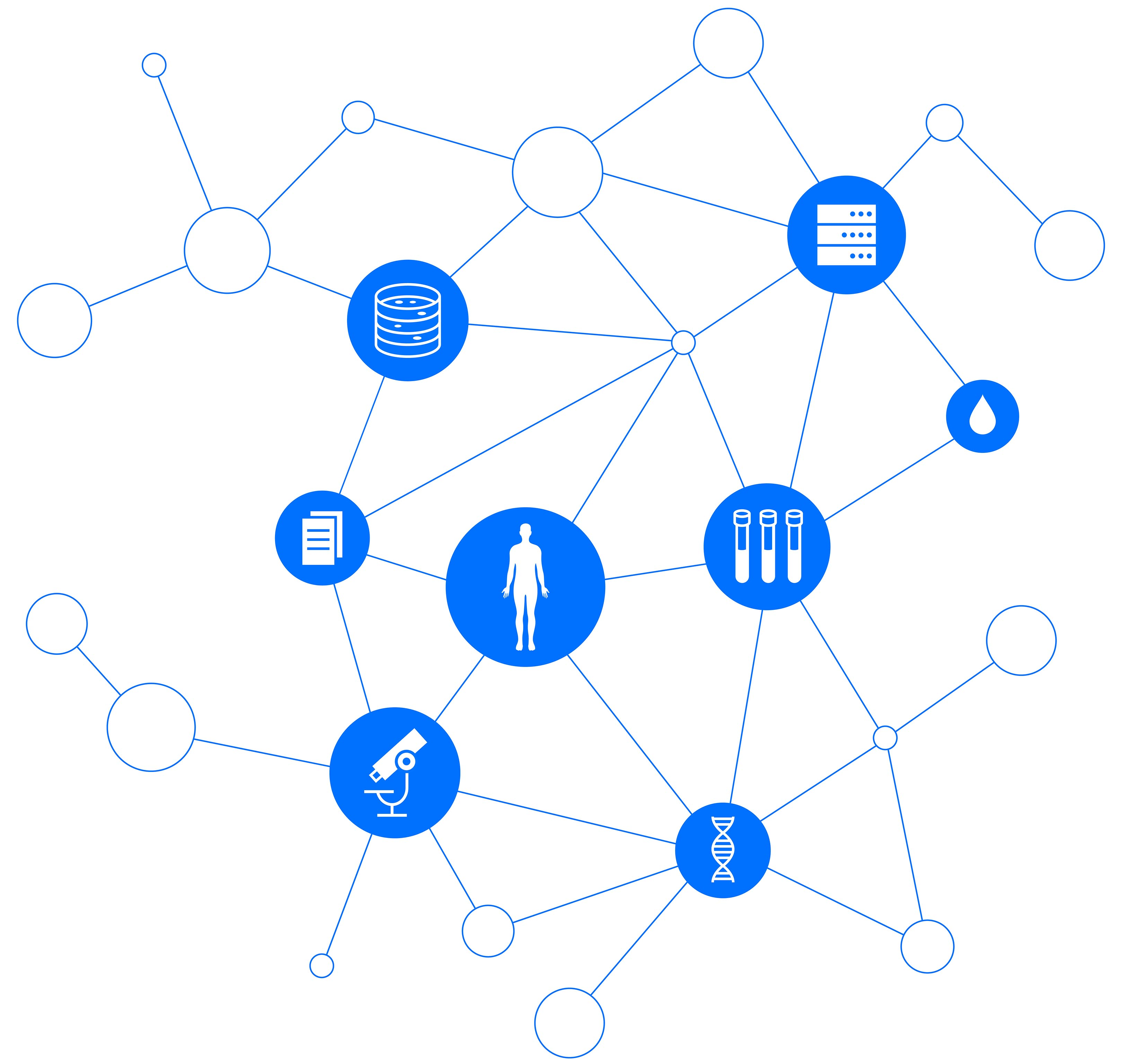 Netz des DKTK